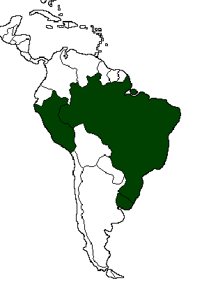 Clasificados de la Conmebol para la Copa Mundial de Fútbol de 1970